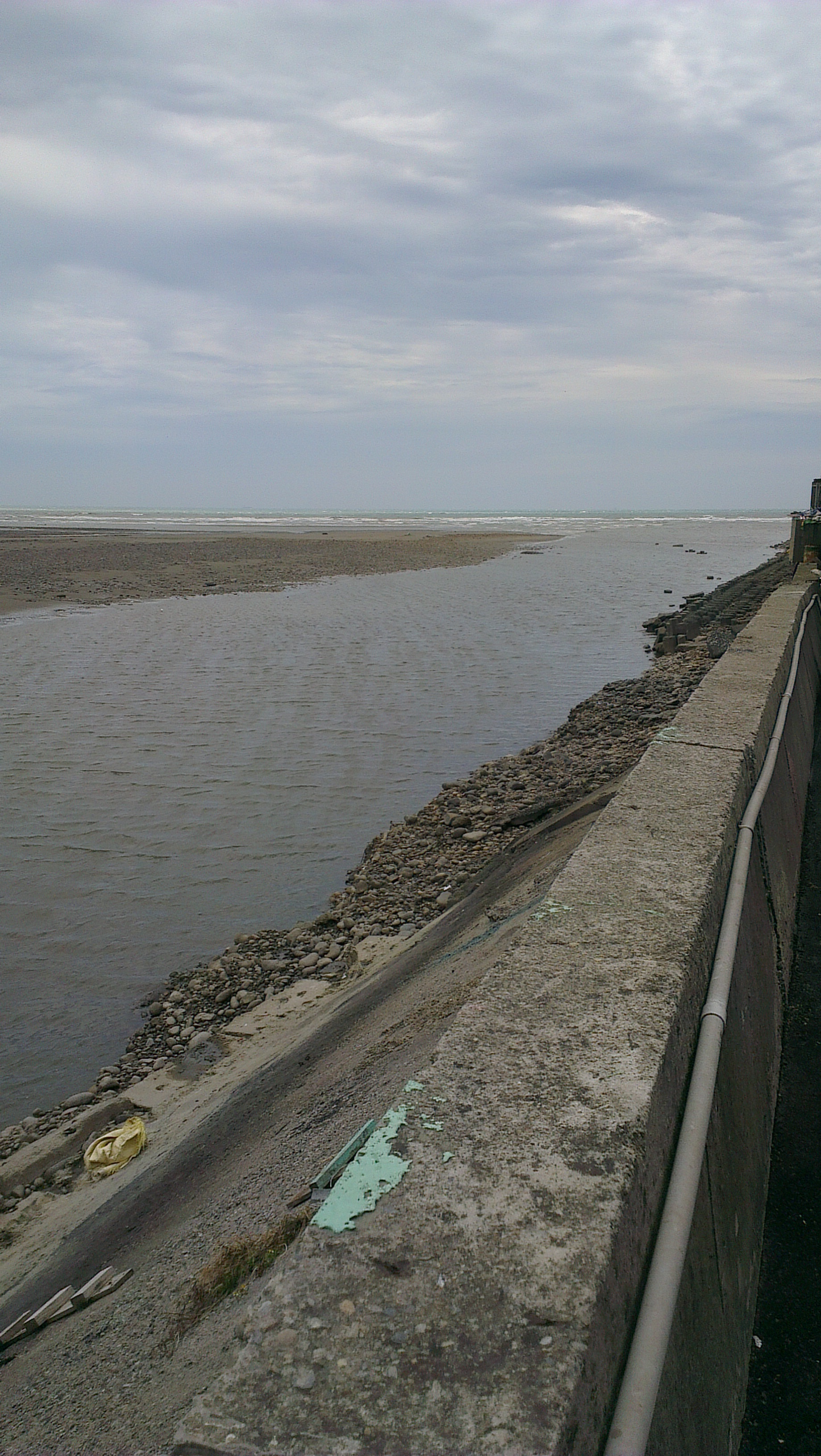 中文（台灣）: 社子溪出海口。